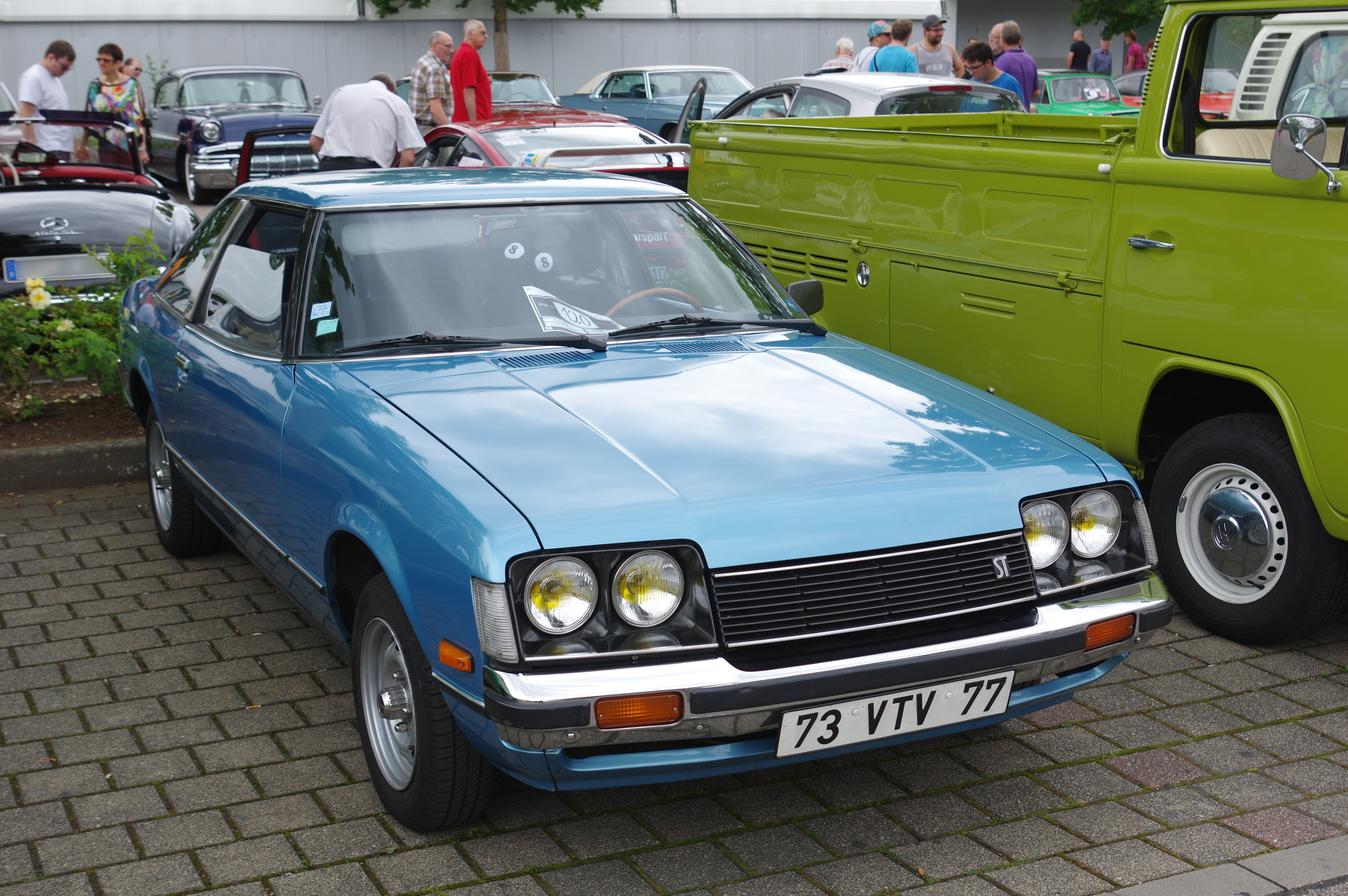 Toyota Celica, 1978, 86 PS, 32. Internationales Oldtimer Treffen Konz 2016, Das Nummernschild ist verfälscht!